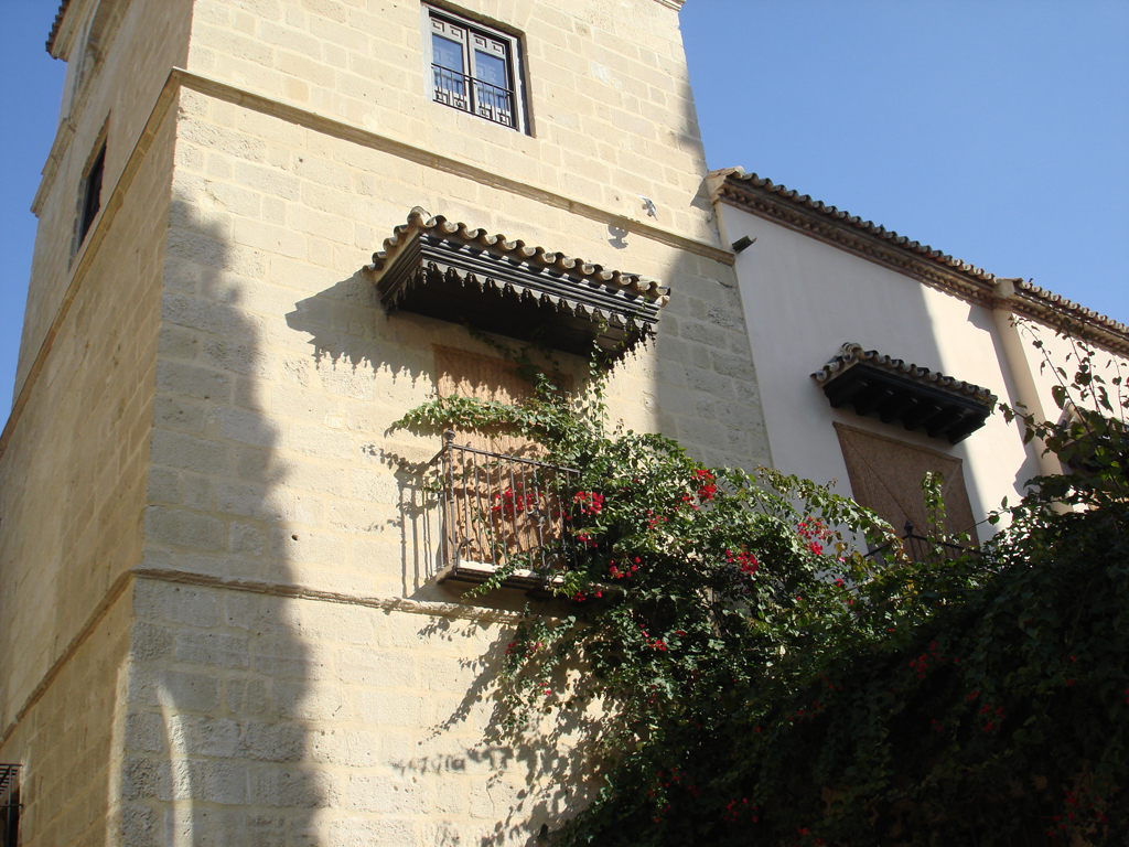 Palacio de Buenavista, sede del Museo Picasso Málaga, España.